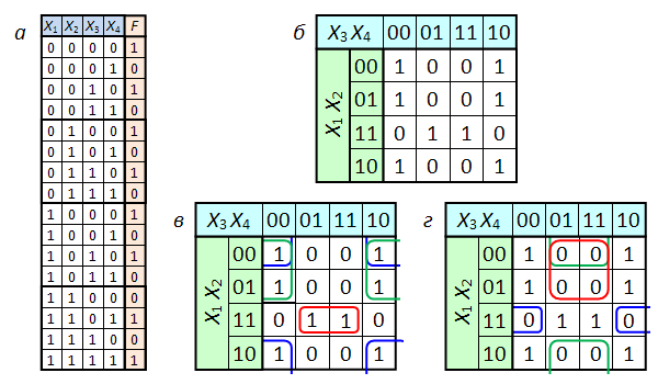 Пример преобразования таблицы истинности в карту Карно и упрощение СДНФ и СКНФ путём объединения единиц и нулей